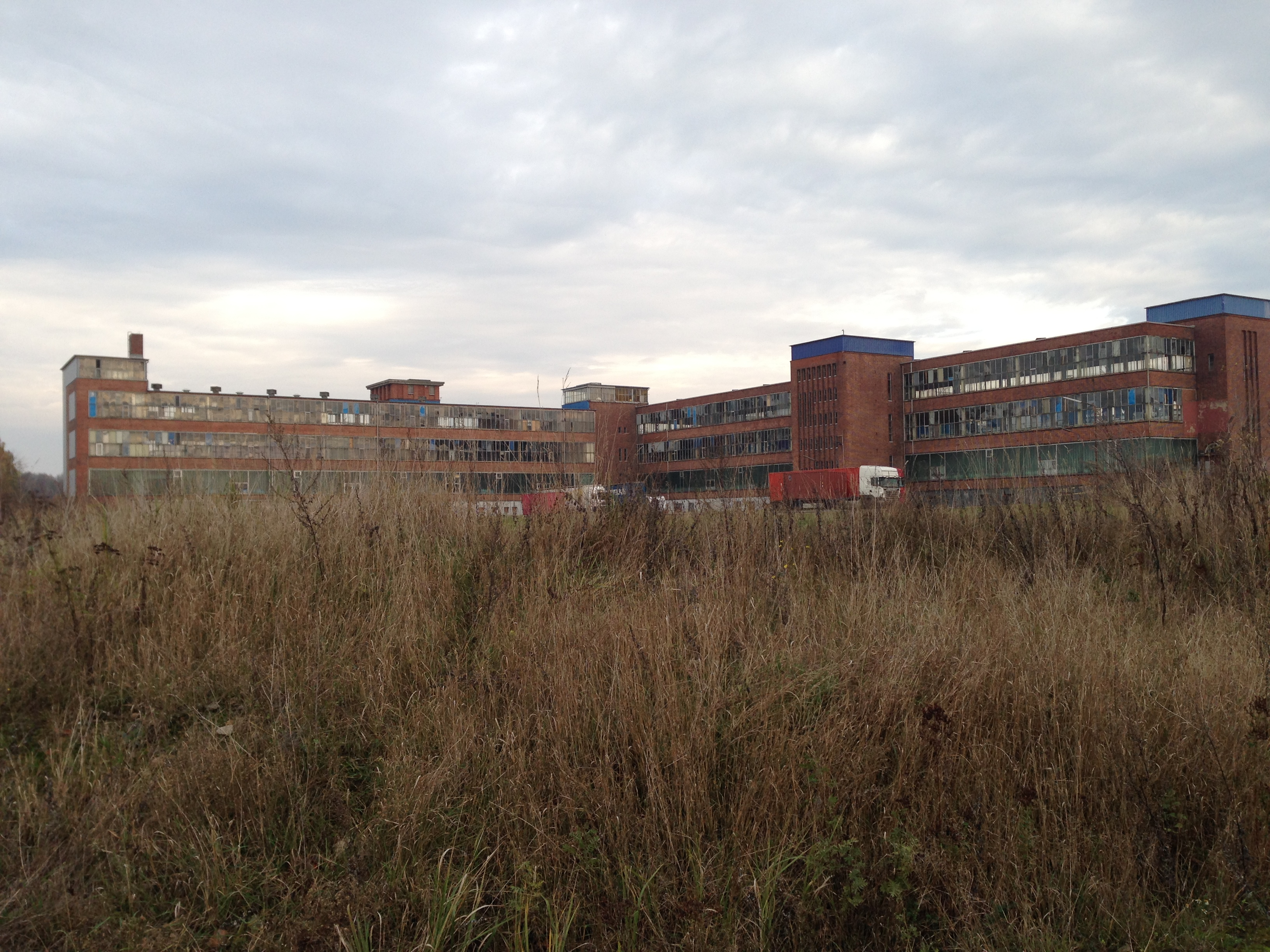 Industrieanlagen in Lübeck